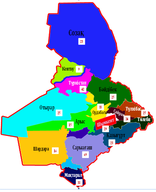 Карта ЮКО